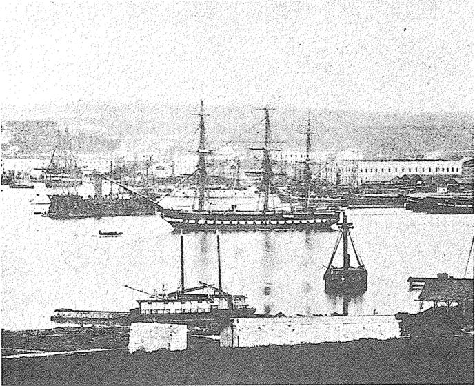 Der Kriegshafen Pola mit der Schraubenfregatte "Schwarzenberg" nach der Seeschlacht von Lissa 1866.